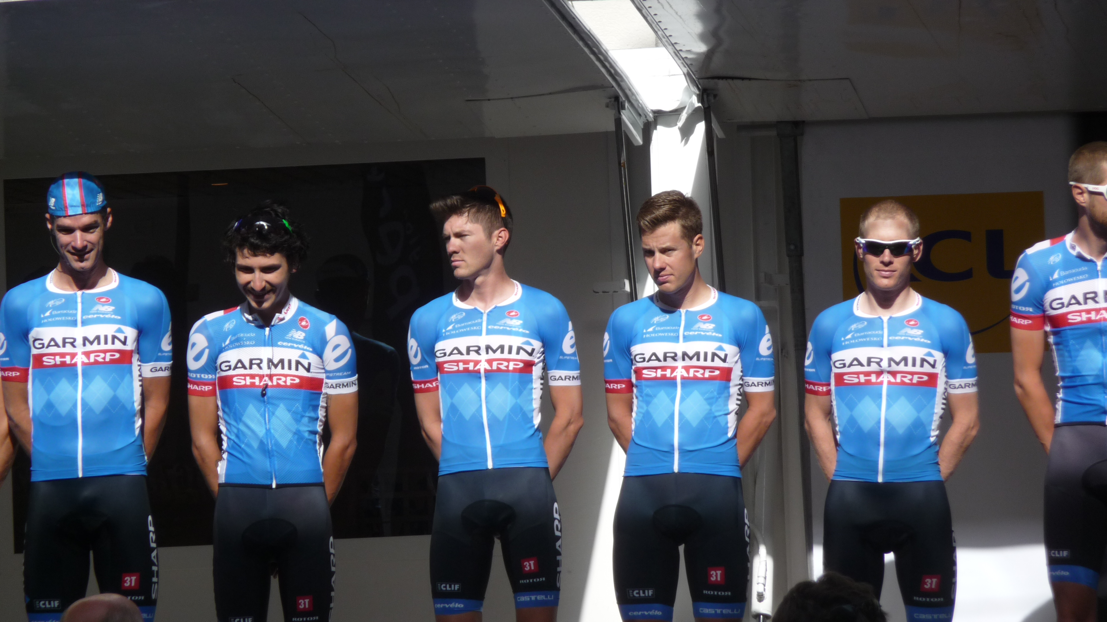 Présentation des équipes du Critérium du Dauphiné 2014 lors du départ de la 2ème étape à Tarare.